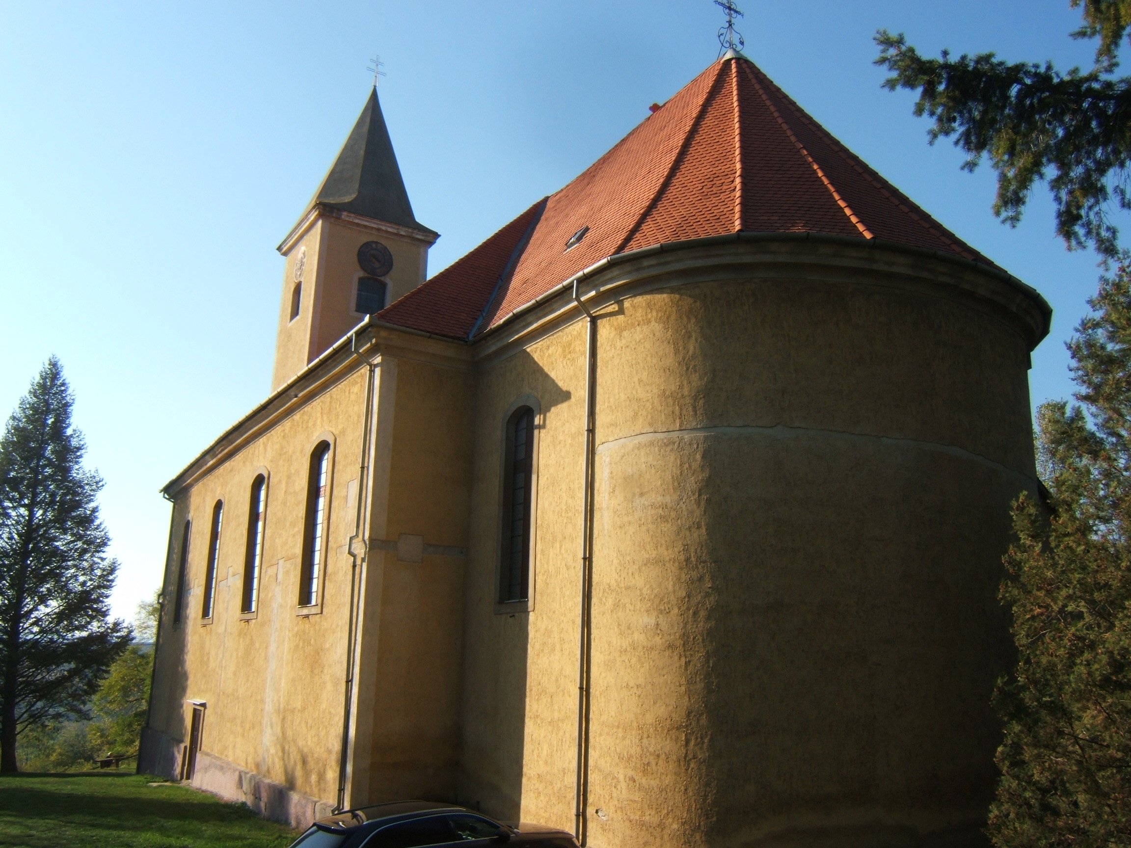 Magyarszék, templom